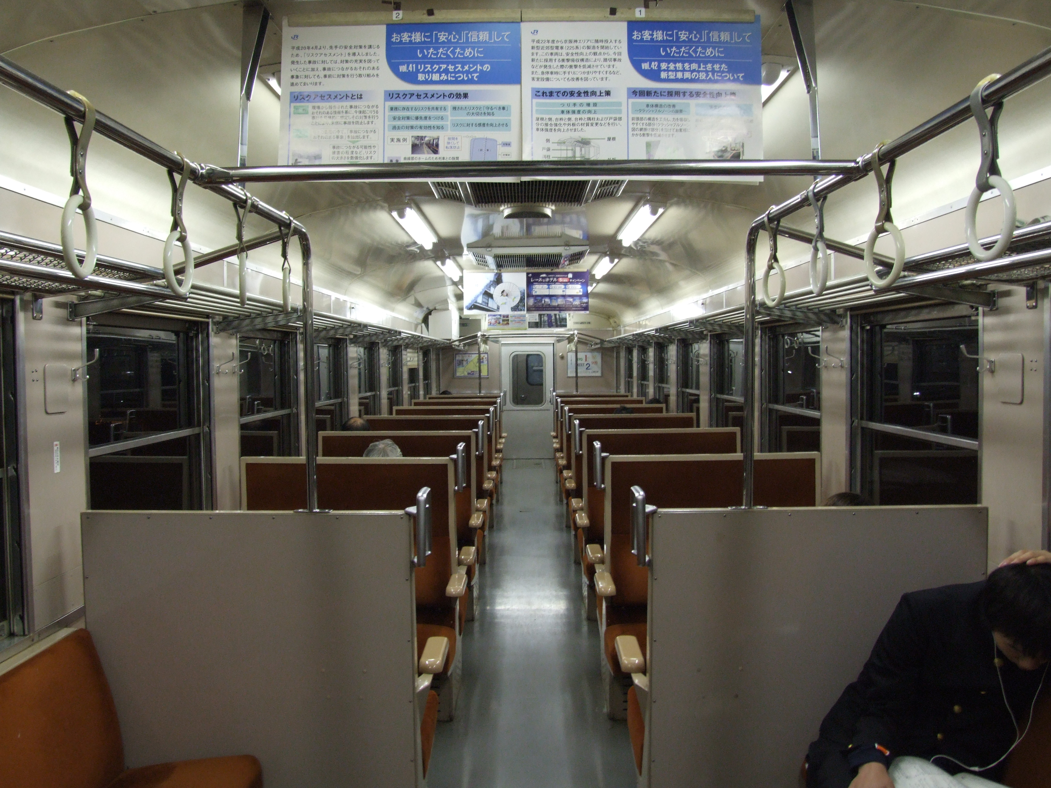 クモハ457系の車内